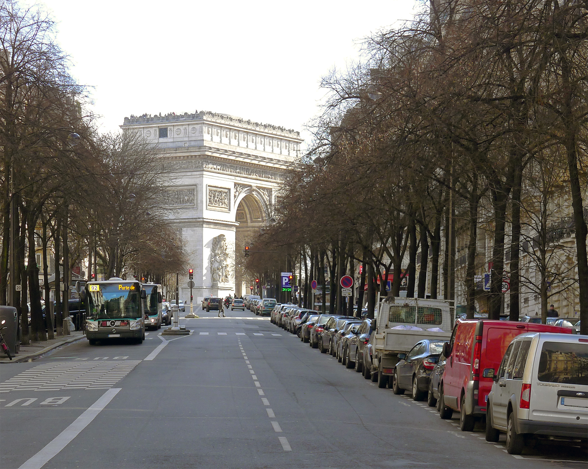 Avenue Mac-Mahon en direction de l'Arc de Triomphe de l'Etoile - Paris XVII